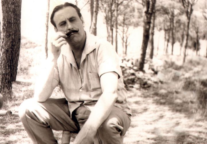 Compositor Libanés Philemon Wehbe. Fotografía tomada en la década de 1950 publicada por la Armada de la República Libanesa.